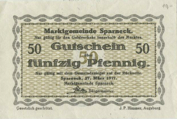 Notgeld aus Sparneck: Gutschein über 50 Pfennig von 1917 (Rückseite unbedruckt, aber von Gemeinde gestempelt)